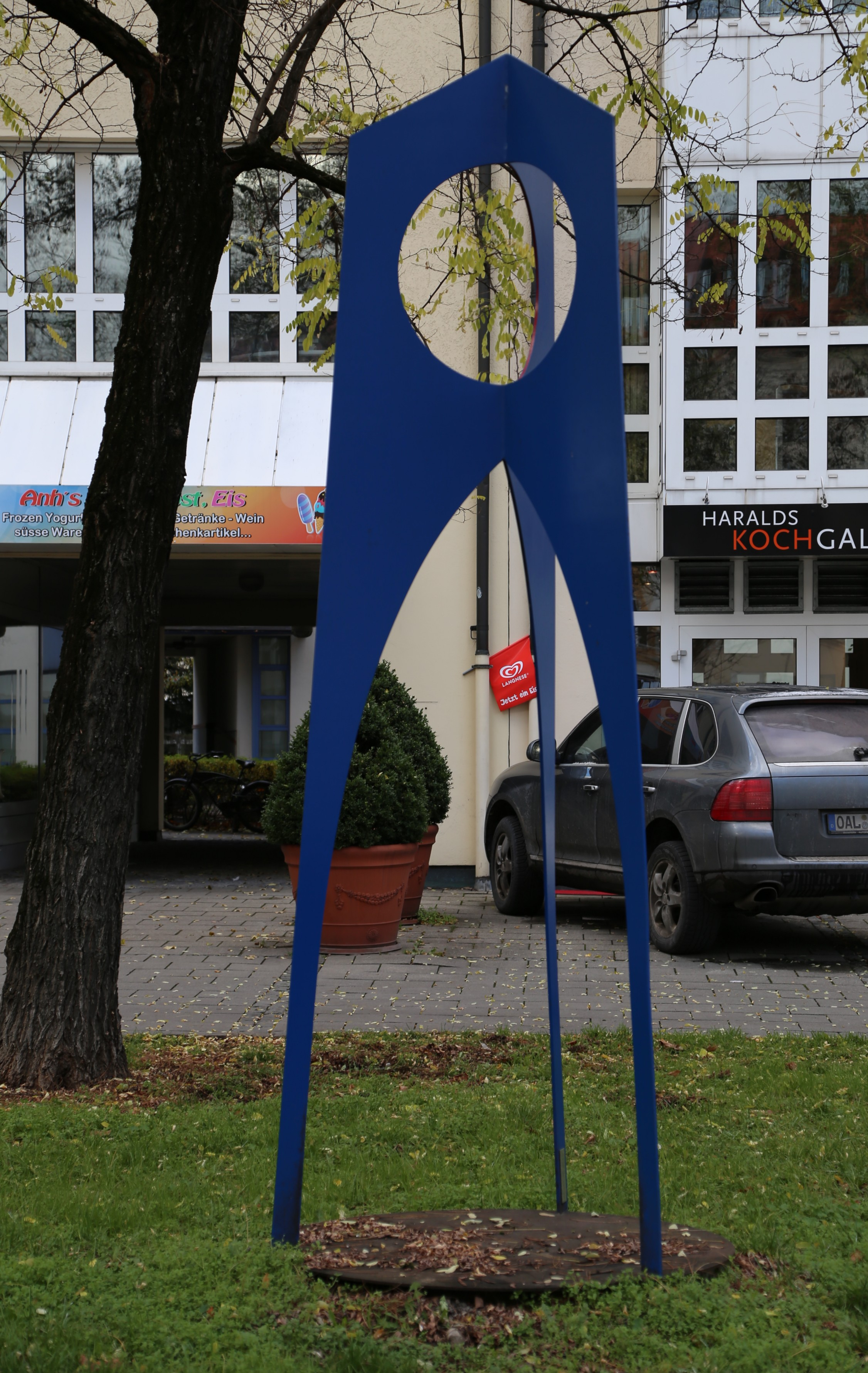 Ingo Glass: Turm, 1985, Stahl, 370 x 100 x 100 cm, Thomas-Wimmer-Ring, München